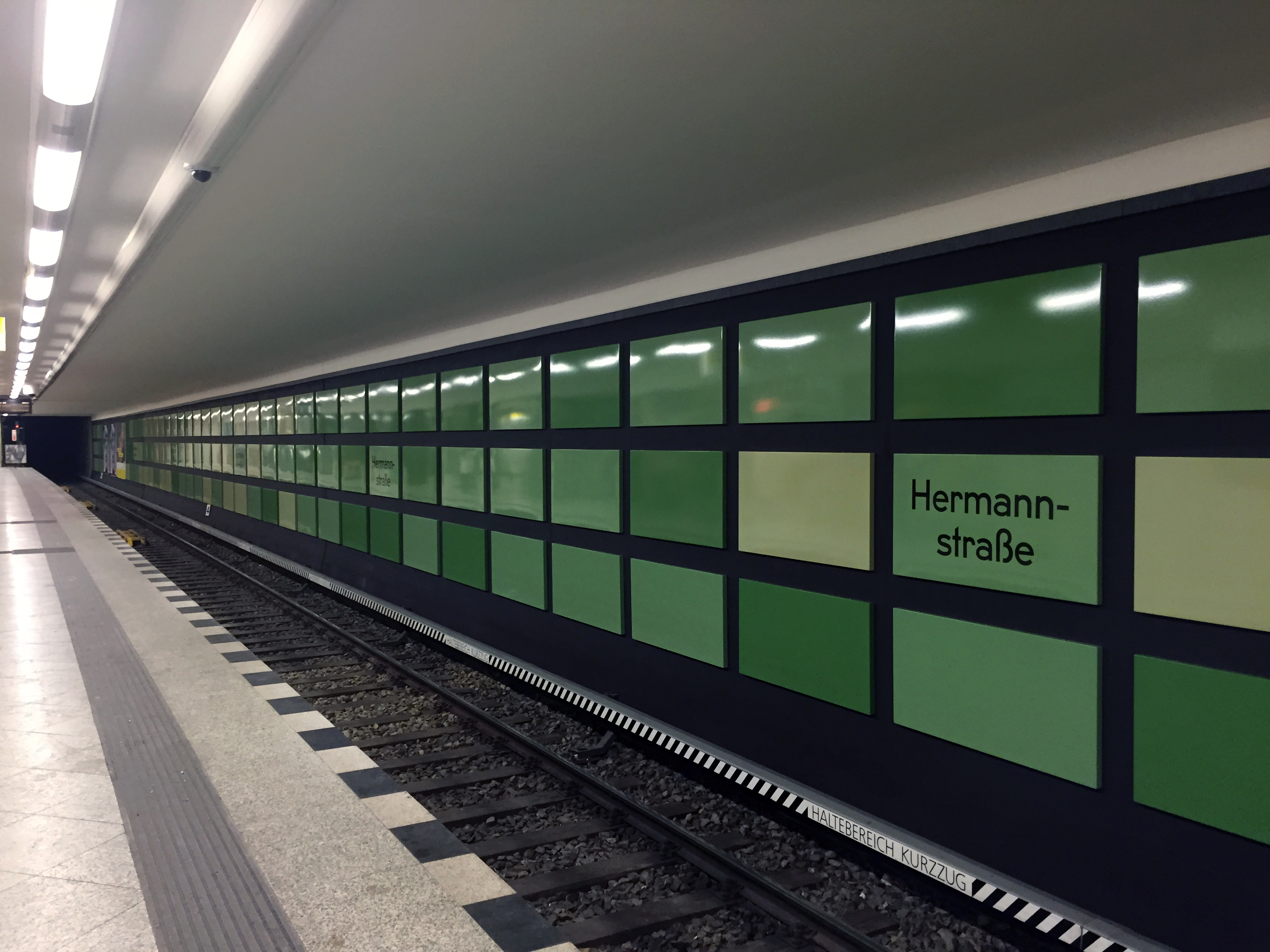 U-Bahnhof der Linie U8, Hermannstraße nach der Sanierung. Bild zeigt den Bahnhof im neuen Motto "Großstadtdschungel".